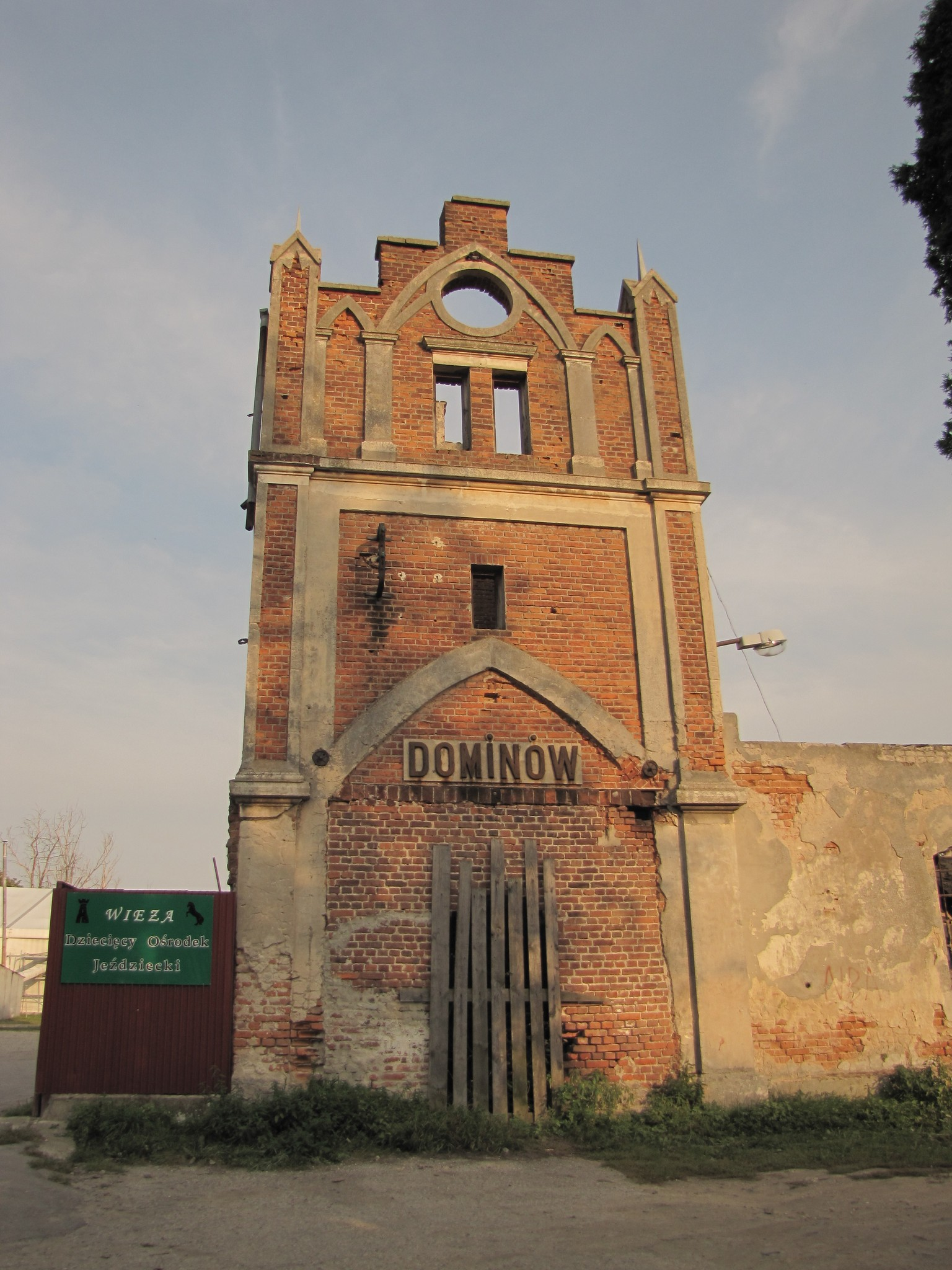 Dominów - zespół dworski